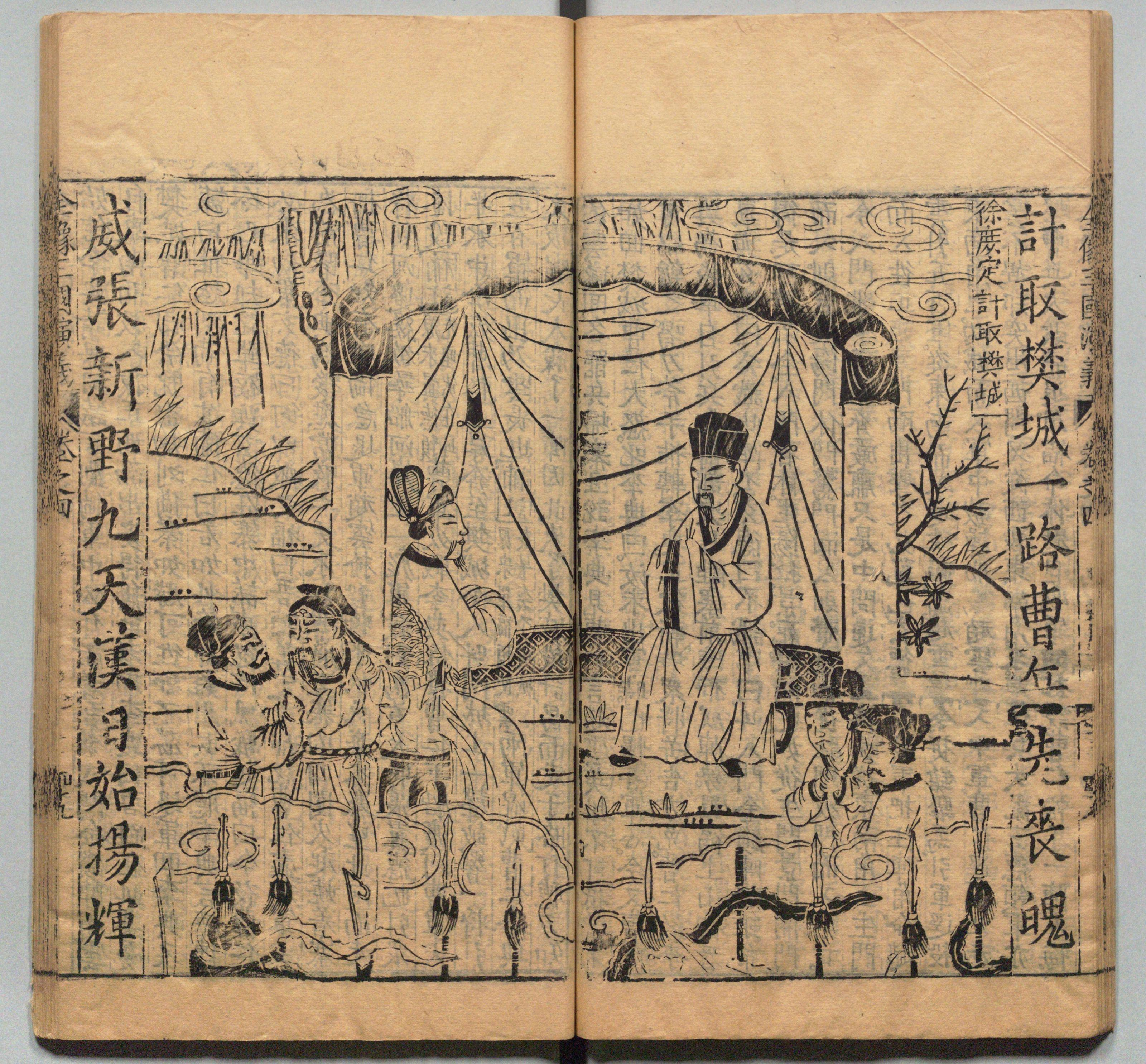 新刊校正古本大字音释三国志通俗演义 明万历十九年书林周曰校刊本